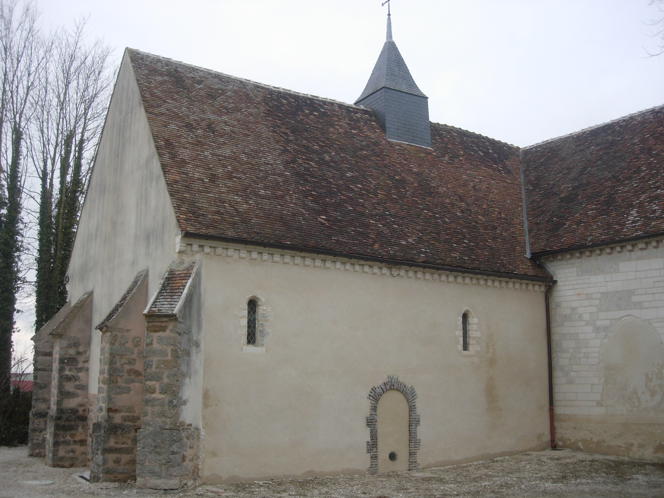 Eglise d'Echemines (Aube - France)